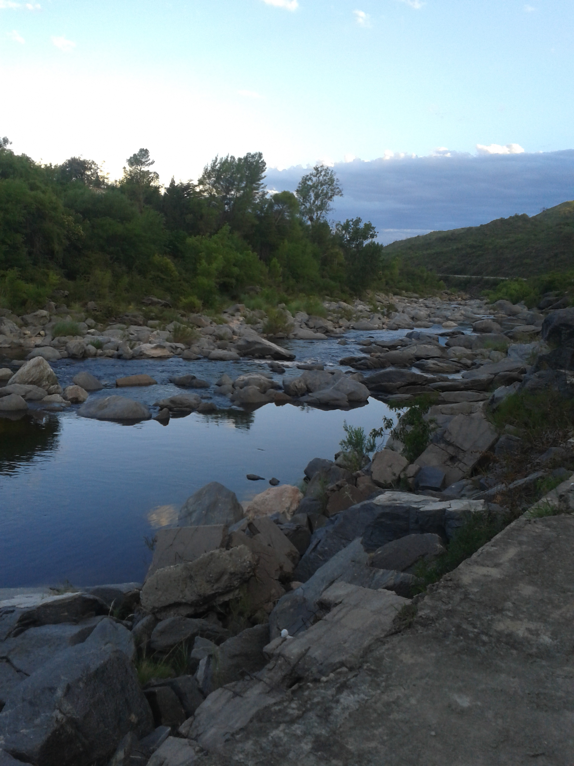 Vista del río San Antonio en una de las playas de Cuesta Blanca.